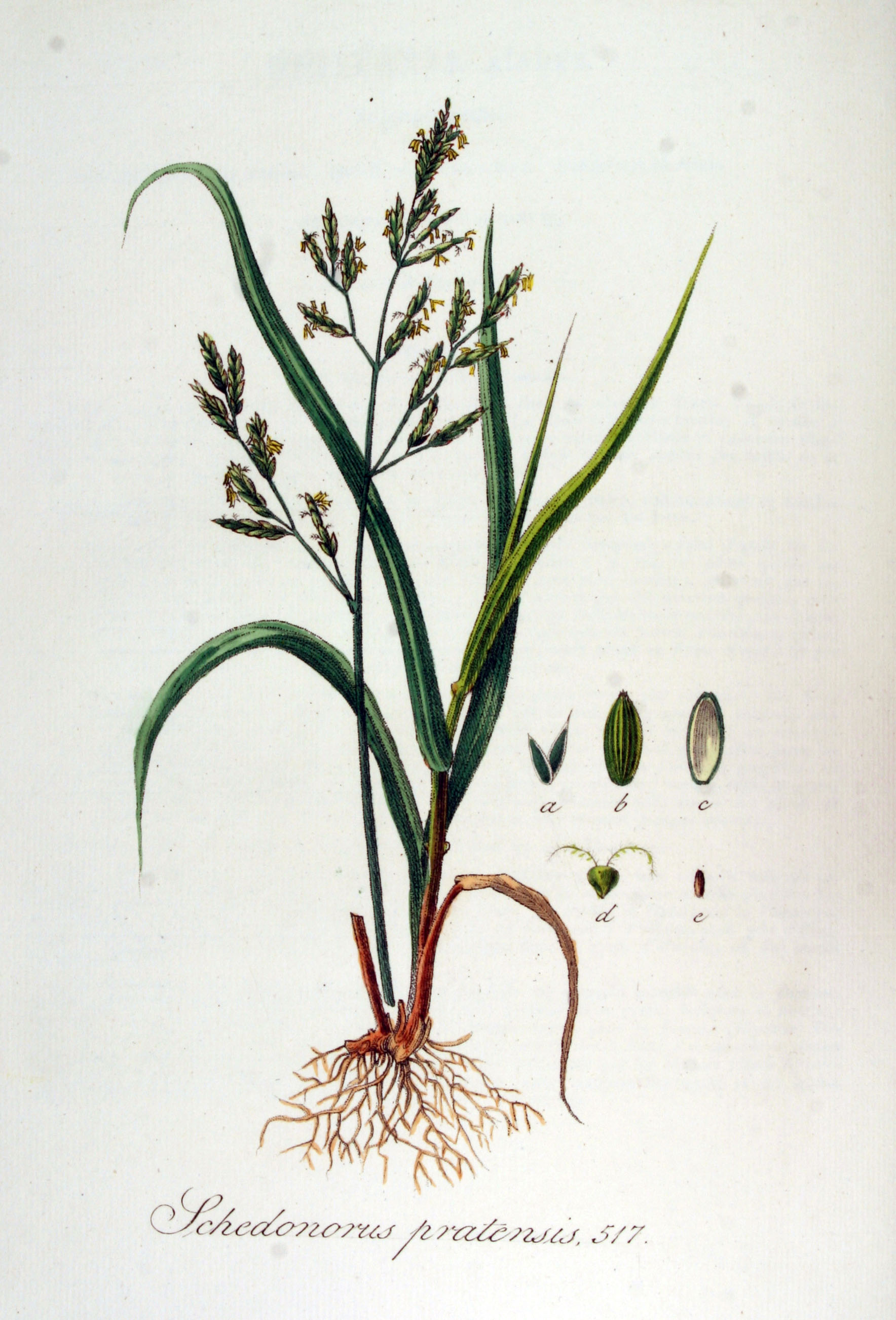 Festuca pratensis Huds. (Syn. Schedonorus pratensis (Huds.) P. Beauv.